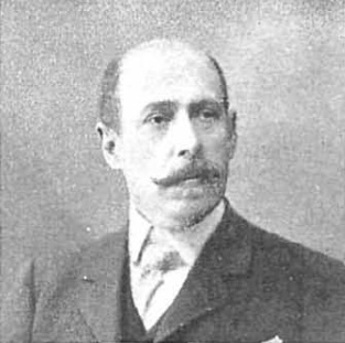 Conde de Albay, subsecretario de Instrucción Pública.